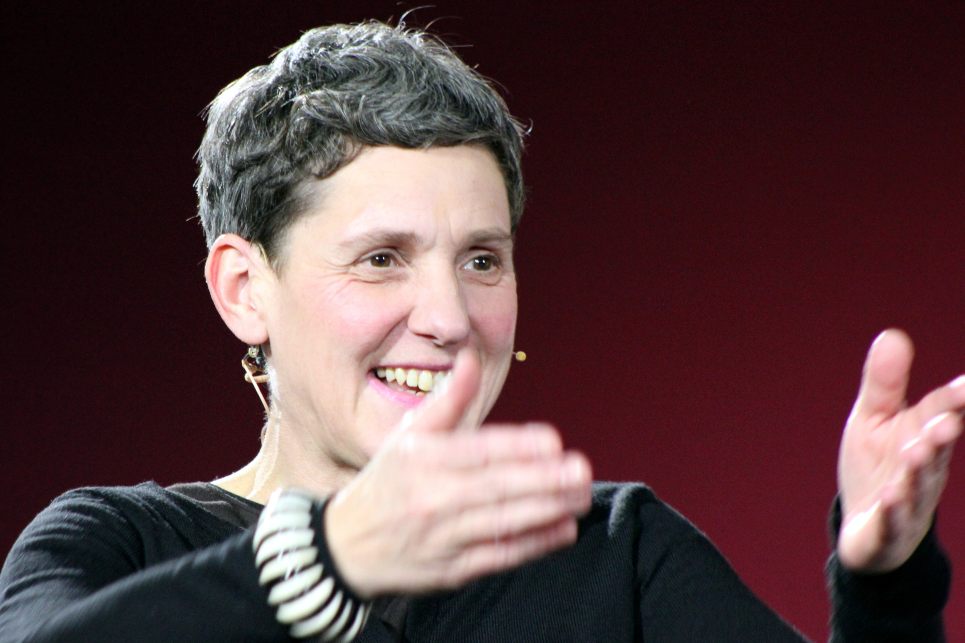 Felicitas Hoppe im Literaturhaus München, Symposion forum:autoren